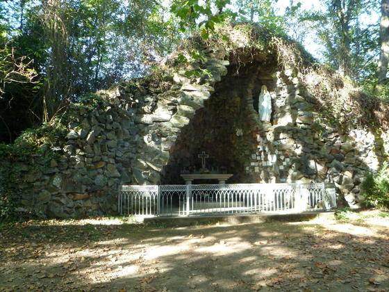 Réplique de Lourdes, Saint-Réverend